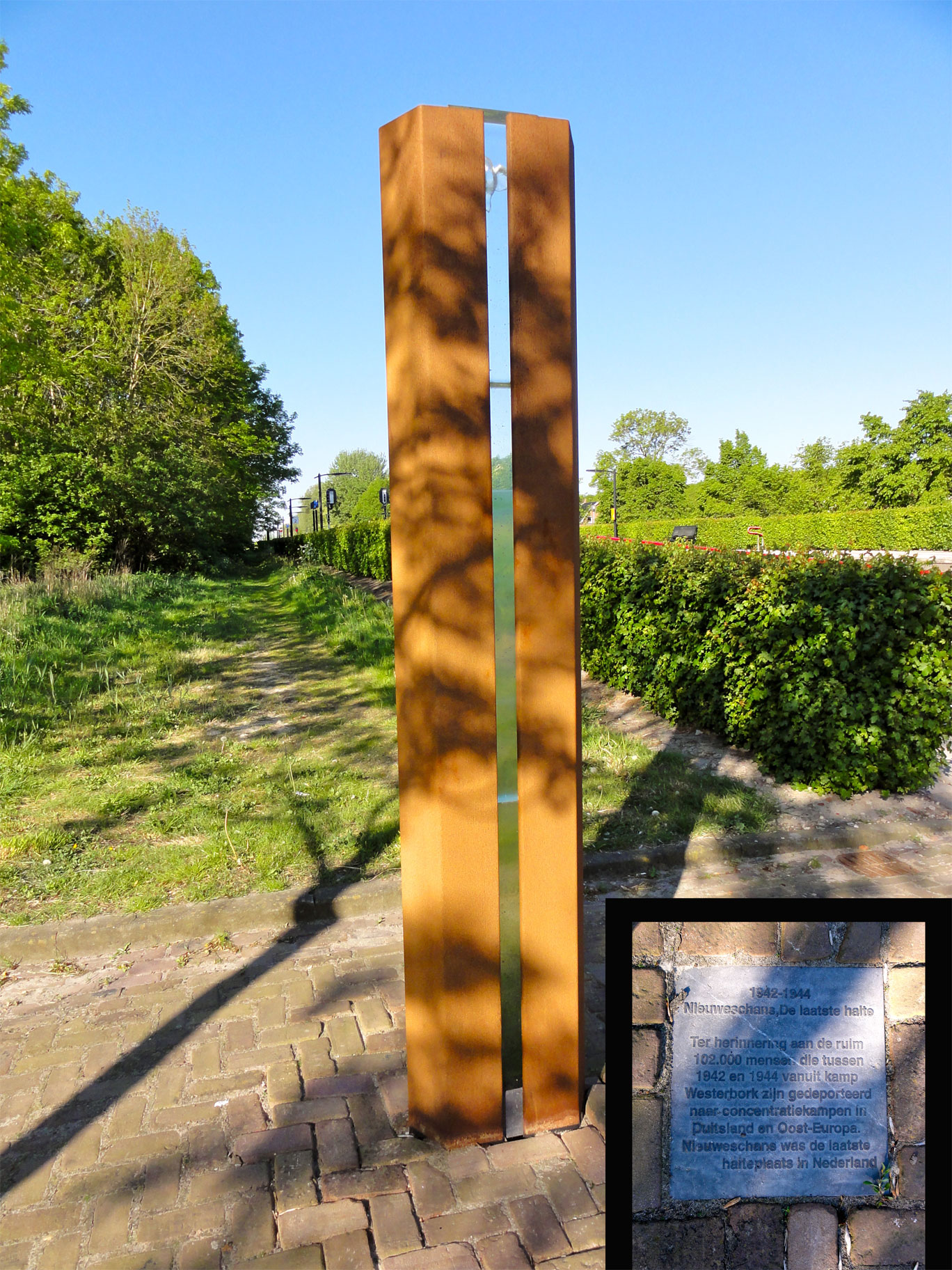 De laatste blik bij Station Nieuweschans, als herinnering aan de 102.000 Joden, die vanuit Westerbork gedeporteerd werden naar de vernietigingskampen in Duitsland en Oost-Europa, beeld gemaakt door Jakobine von Dömming, Els Otten en Hein van de Water